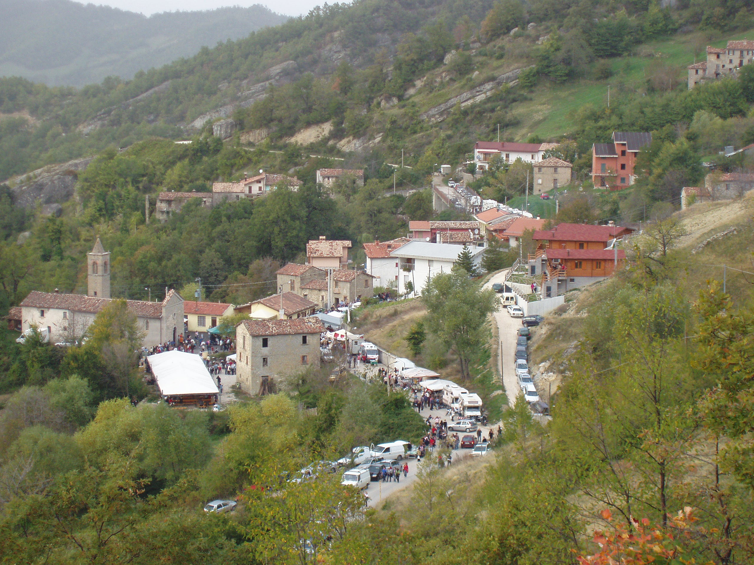 Leofara durante la Sagra della castagna, ottobre 2004